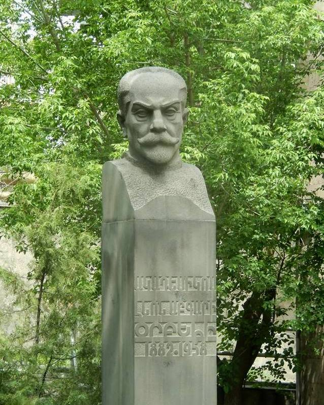 Լևոն Օրբելու հուշարձանը, քանդակագործ` Գաբրիել Եփրոյան